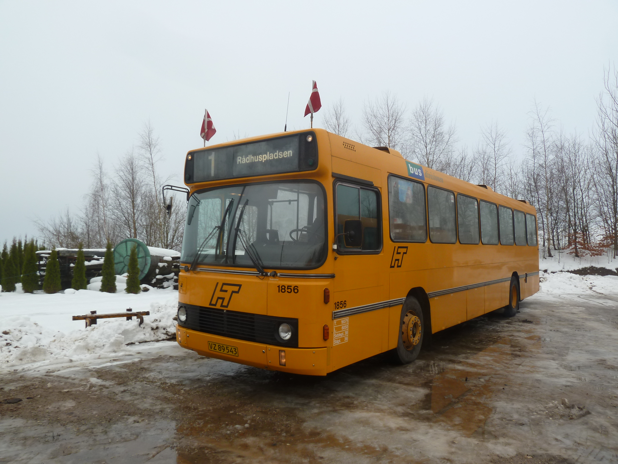 Open for Christmas on Sporvejsmuseet Skjoldenæsholm in Denmark. Old bus from Copenhagen, HT 1856.